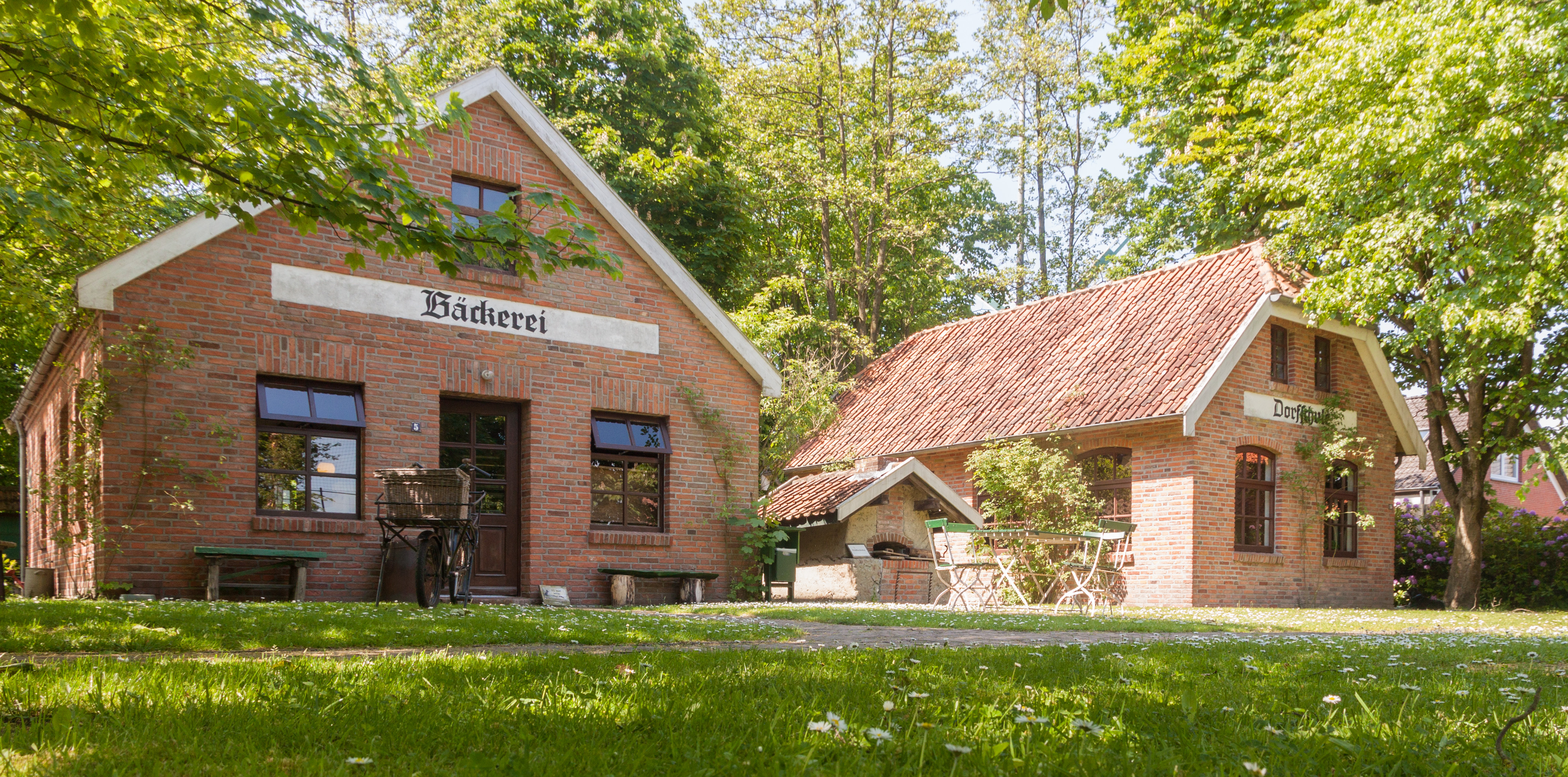 Dorfmuseum Münkeboe - Schule und Bäckerei